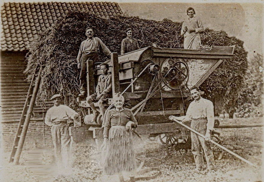 Vers 1920 à Millebosc